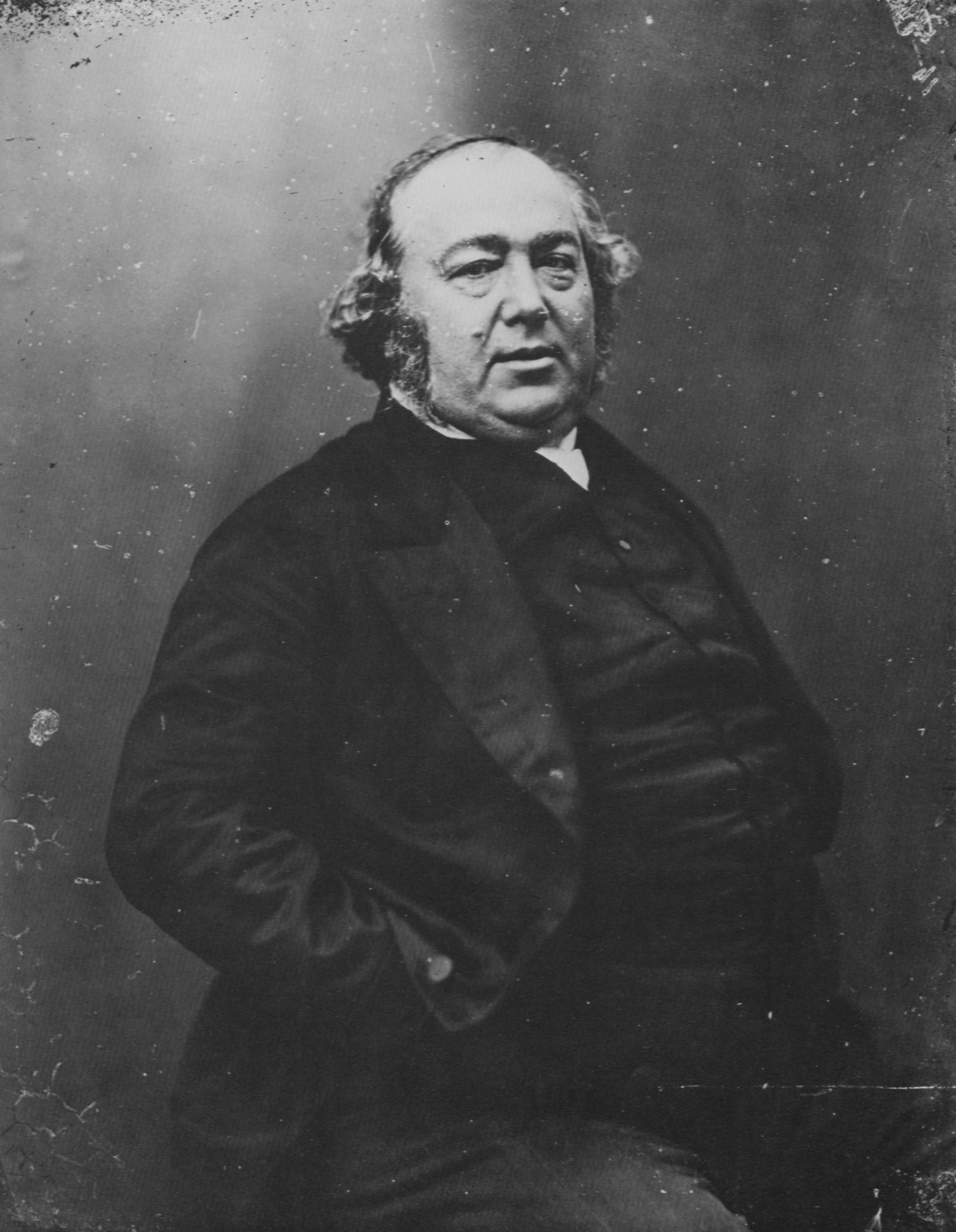 Tournachon, Gaspard-Félix: Jules Janin (1804-1874)